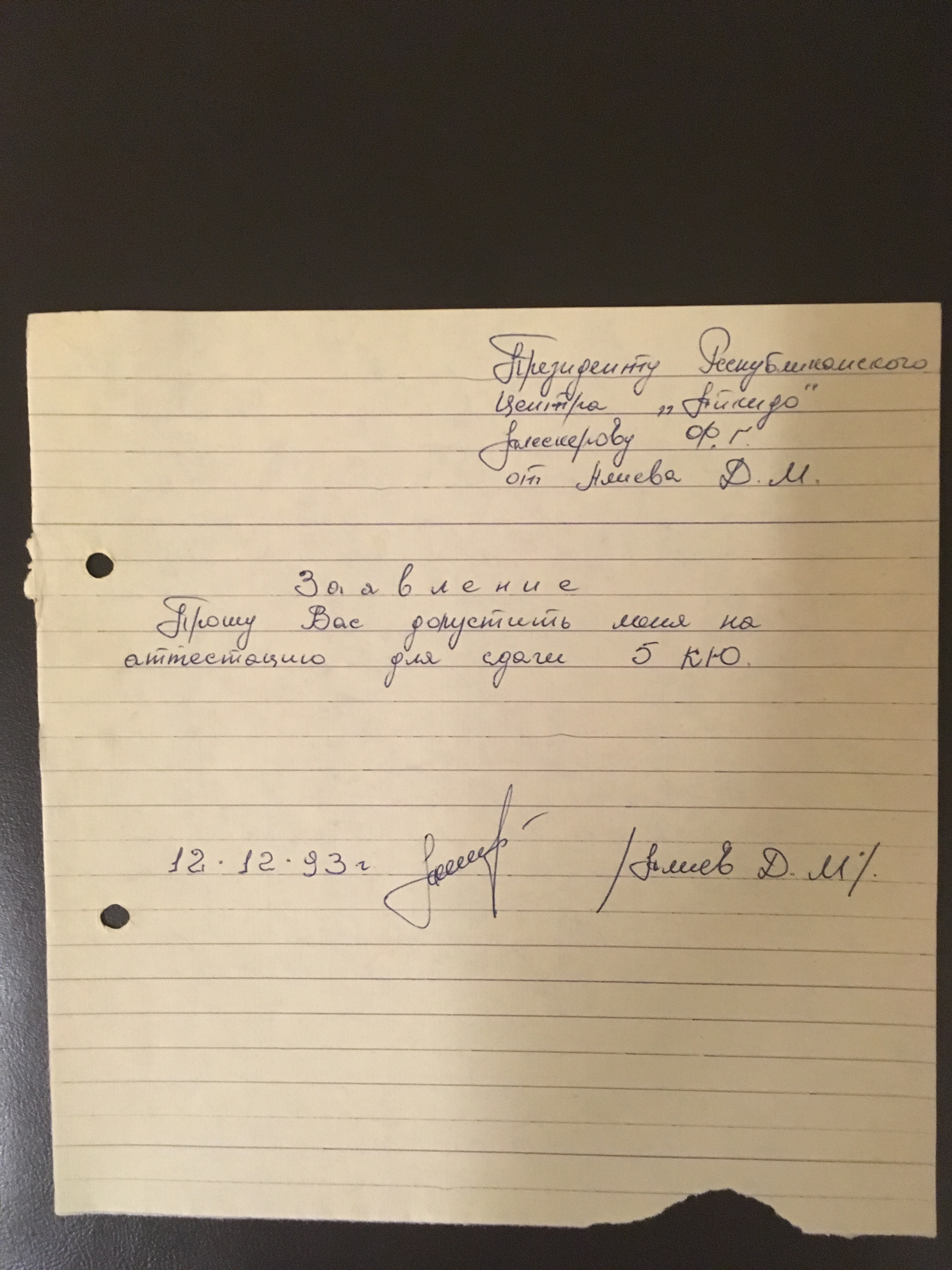 Cahangir Əliyevin Sensei Fərhad Ələsgərova yazılı müraciəti.